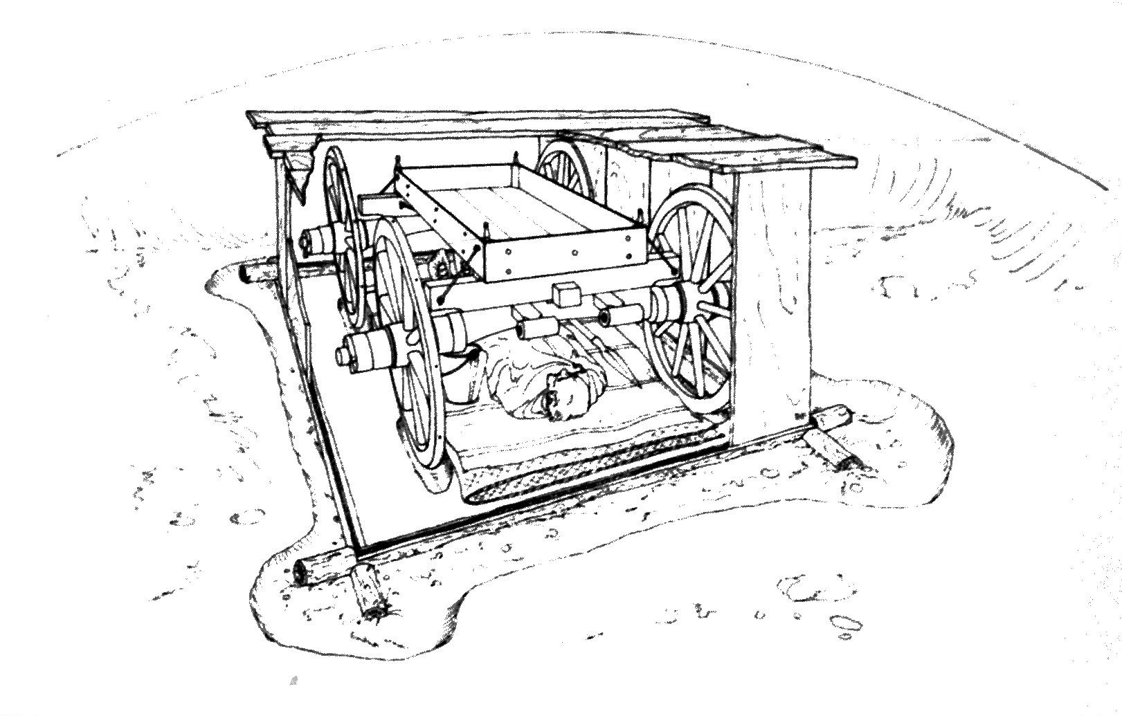 Rekonstruktion des Wagengrabs von Bell